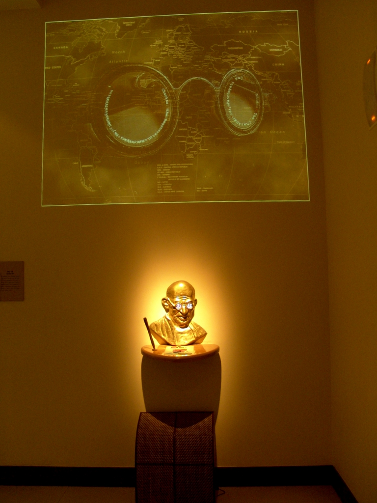 Eternal Gandhi Multimedia Museum, Delhi